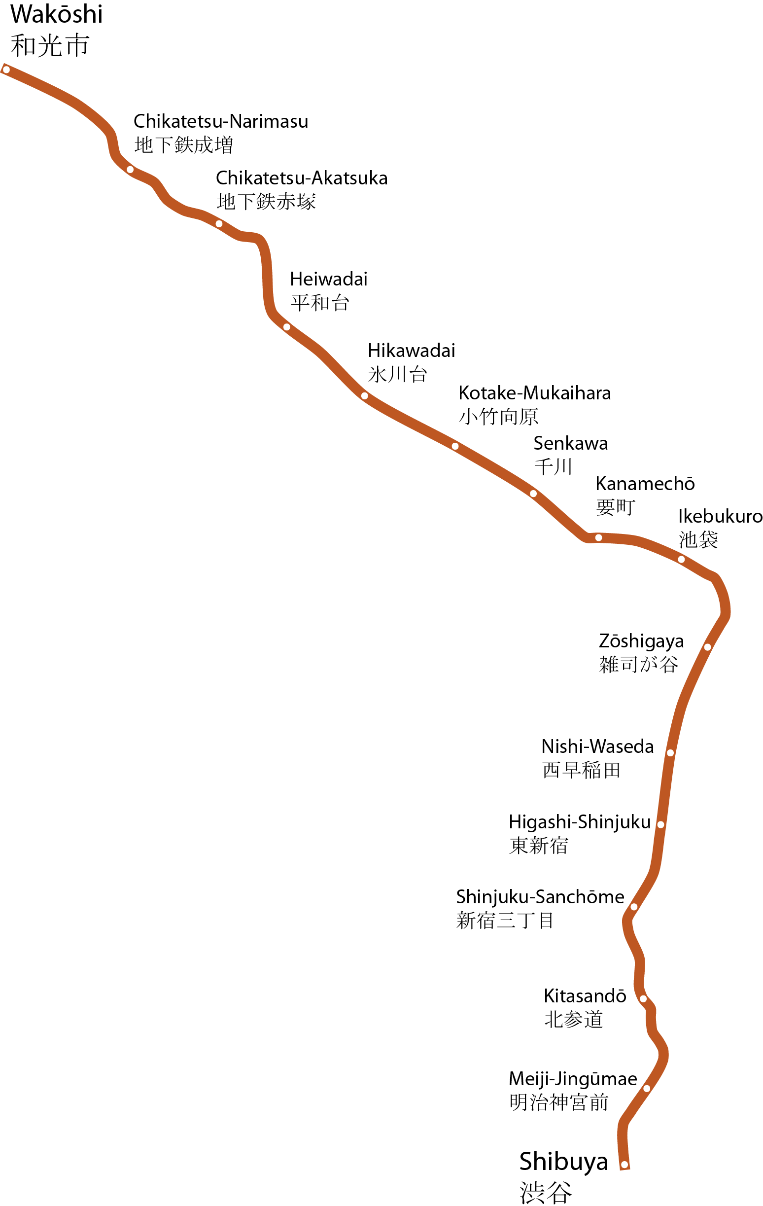 Mapa geogràfic aproximat de la Fukutoshin Line.